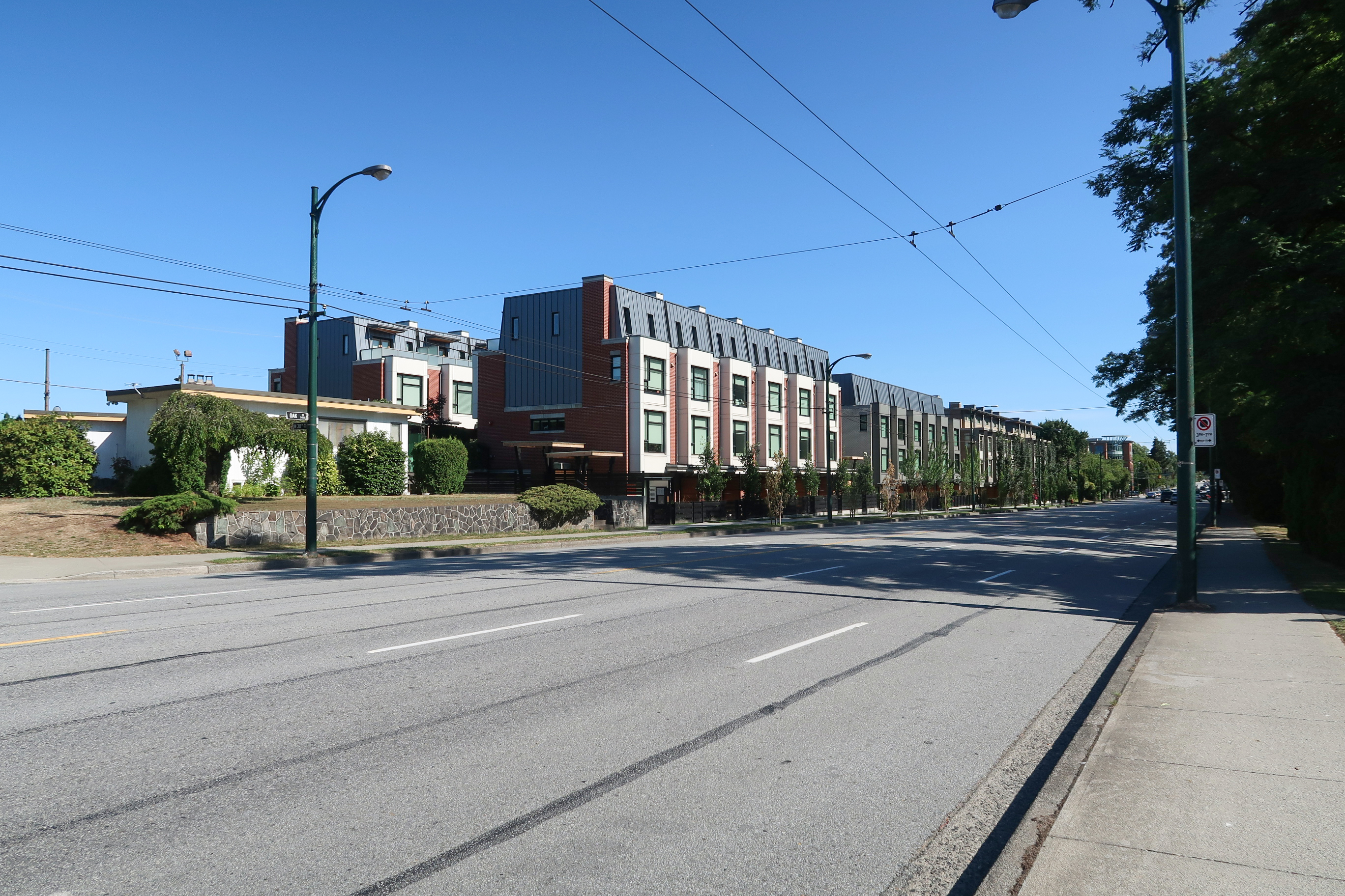 Oak Street in Vancouver